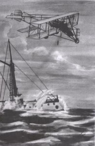 batalla aerea en la revolucion mexicana de 1910